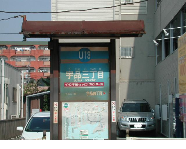 広島電鉄宇品三丁目電停下り線に設けられた屋根